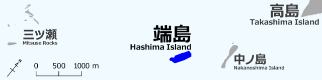 高島、中ノ島、端島(軍艦島)、三ツ瀬の地図